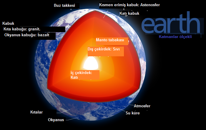 Dünyanın iç yapısı